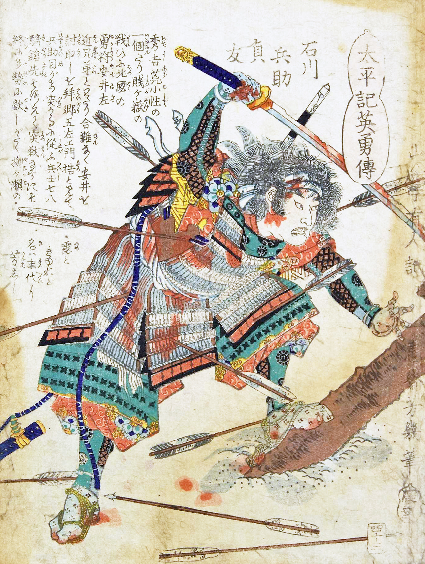 「太平記英勇伝四十三：石川兵助貞友」